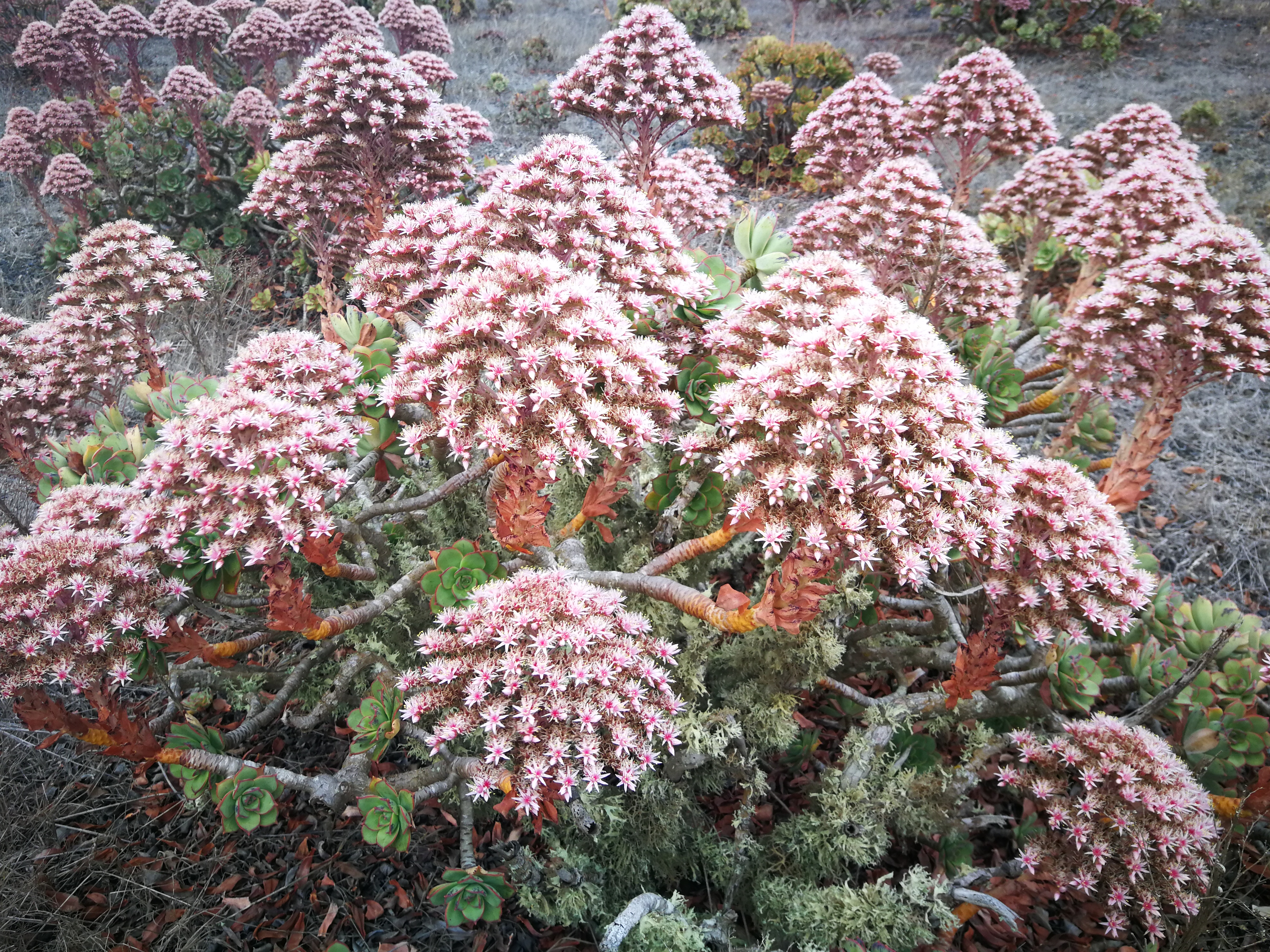 Los flores de Verol en un campo cerca de Máguez en Lanzarote en la primavera del 2020